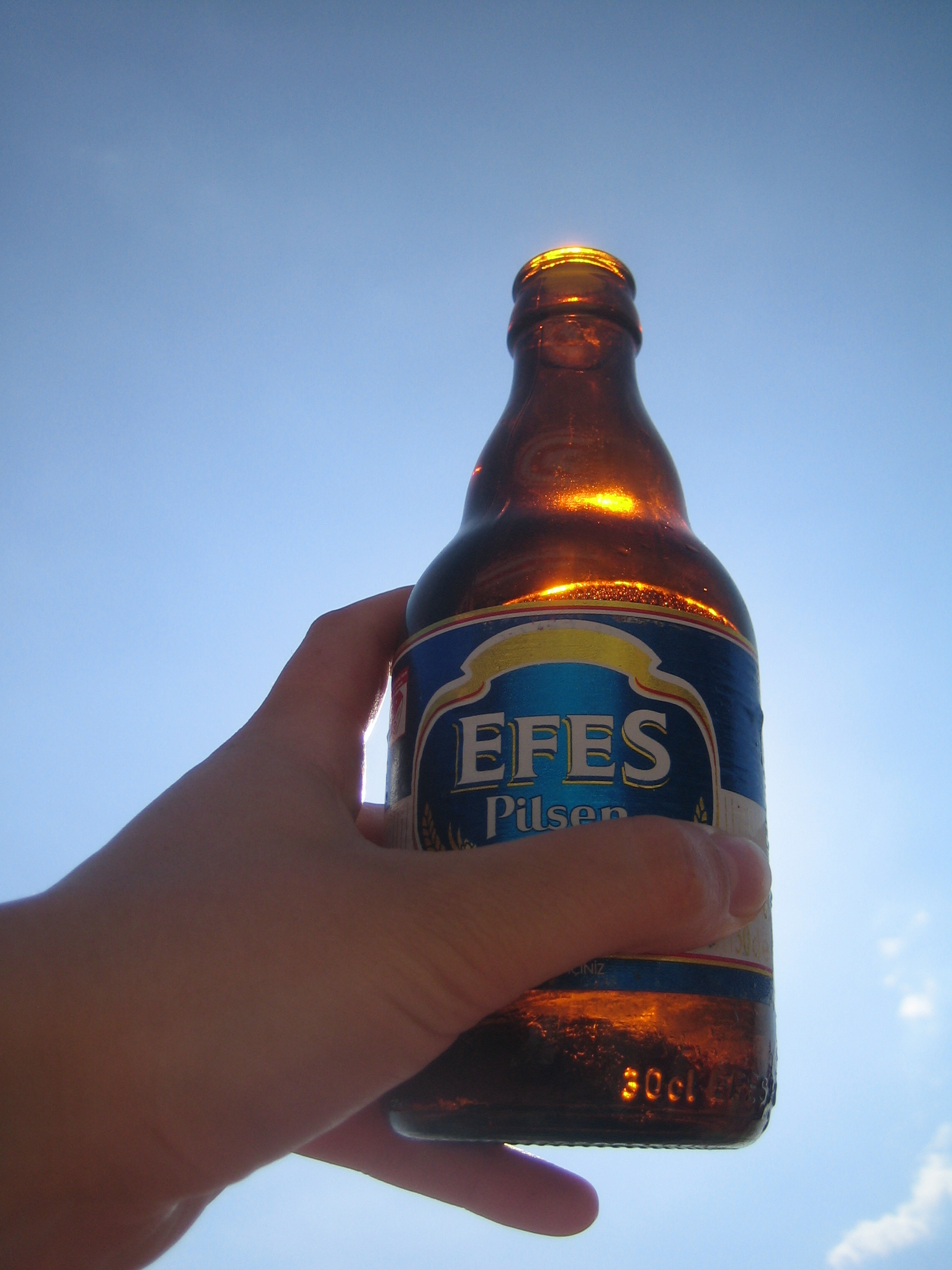 Holding a Efes pilsen